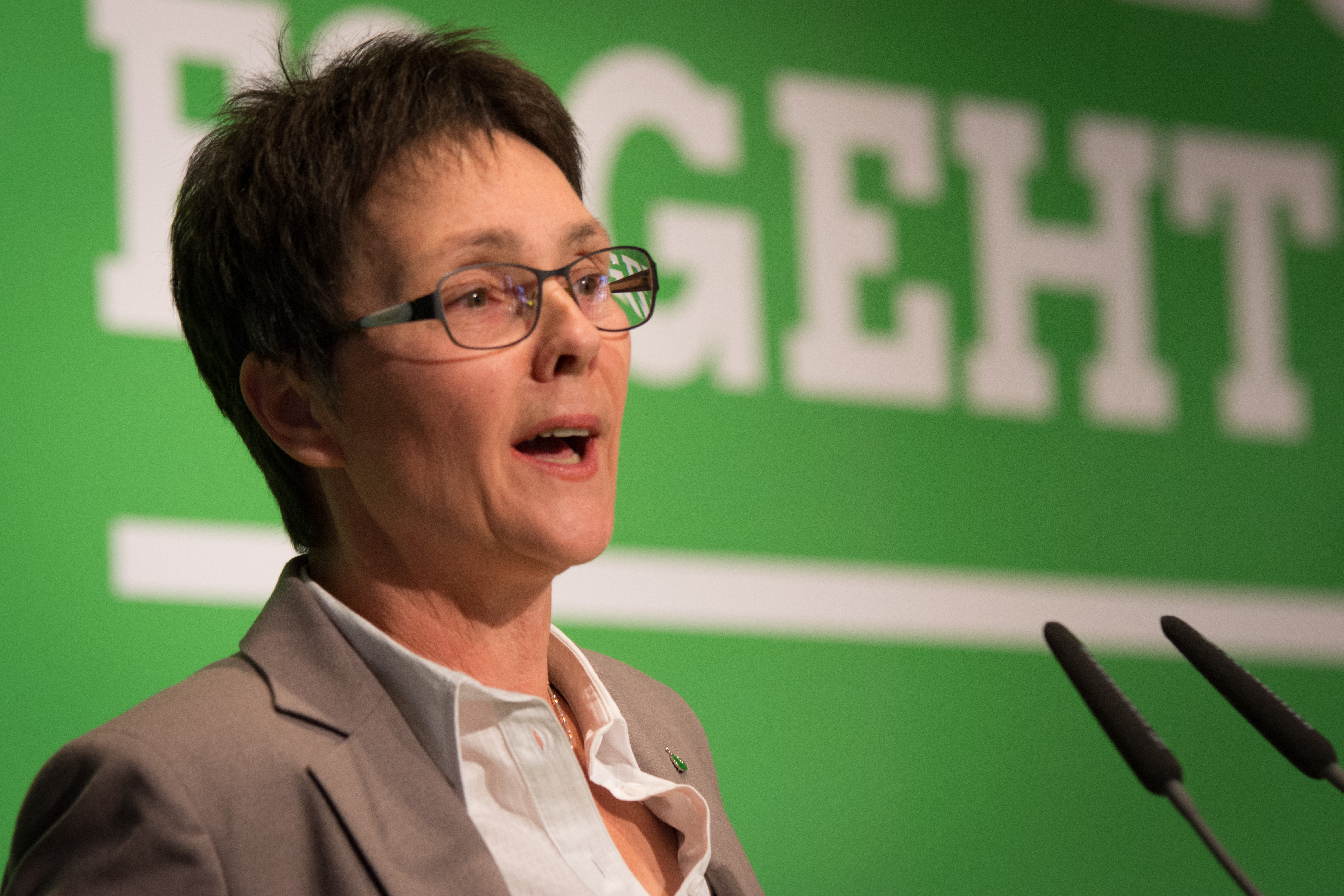 Monika Heinold bei der Wahl zur Spitzenkandidatin zur Landtagswahl am 7. Mai 2017 auf dem Landesparteitag von Bündnis 90/Die Grünen Schleswig-Holstein in Neumünster.